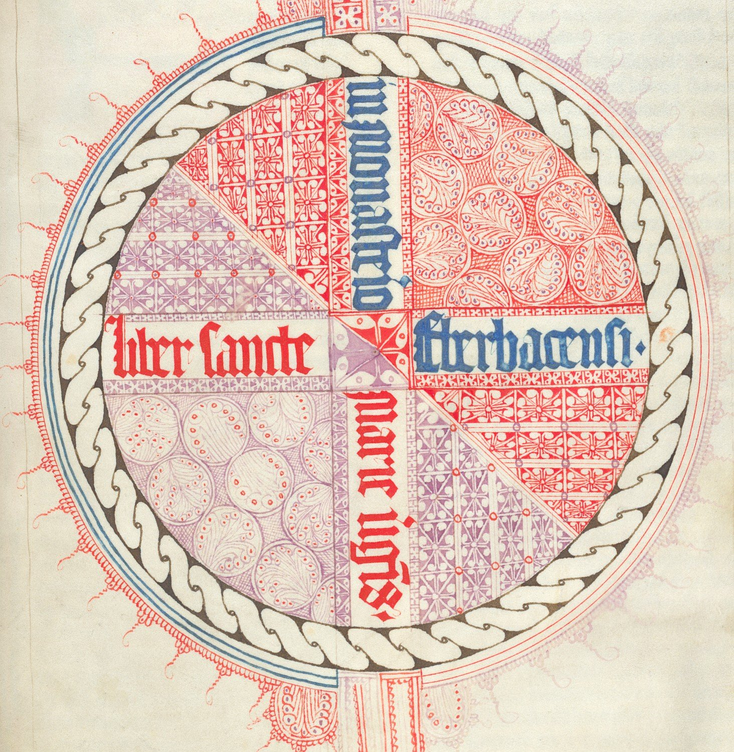 Ein Exlibris des Kloster Eberbach. Das Buch wurde 1413 verfasst und befindet sich heute in der Sammlung der Arundel-Manuskripte in der British-Library, London